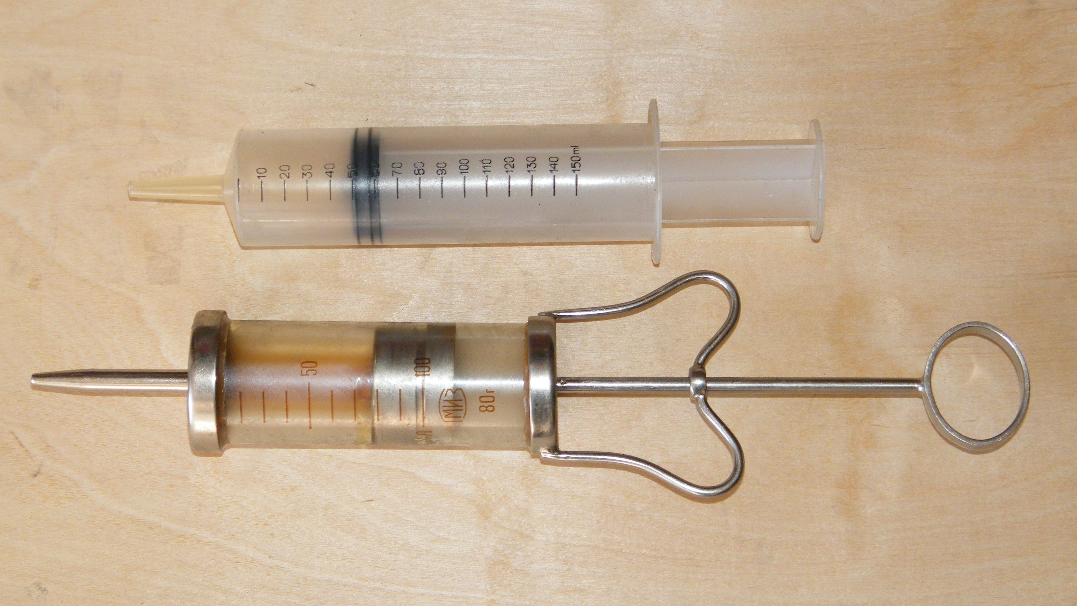 Шприцы Жане